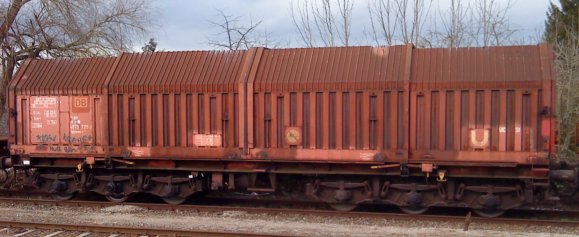 Sechsachsiger Flachwagen der DB für den Transport von Coils; aufgenommen im Bahnhof Günzburg